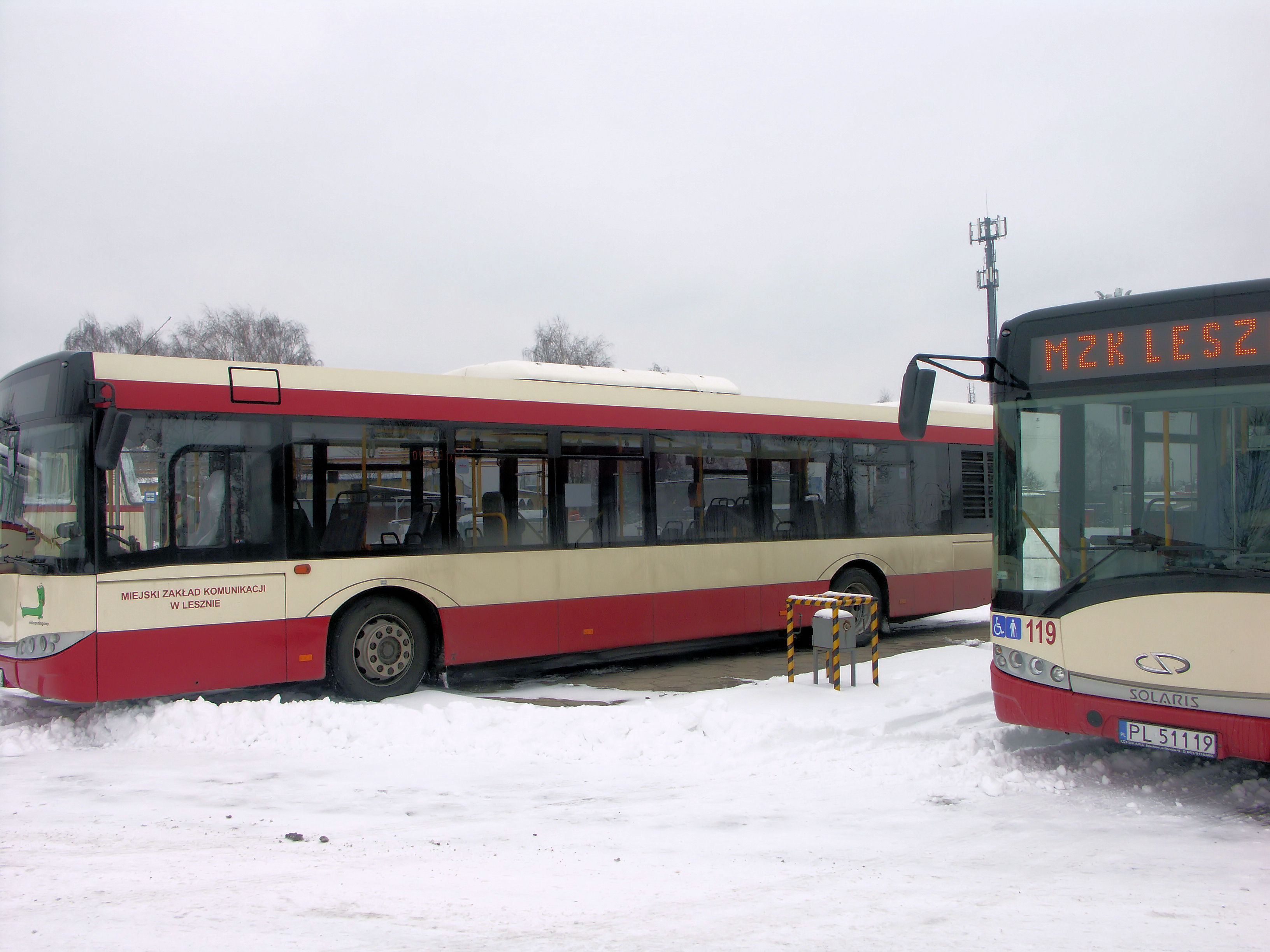 Solarisy Solaris Alpino 8,9 LE w zajezdni MZK Leszno